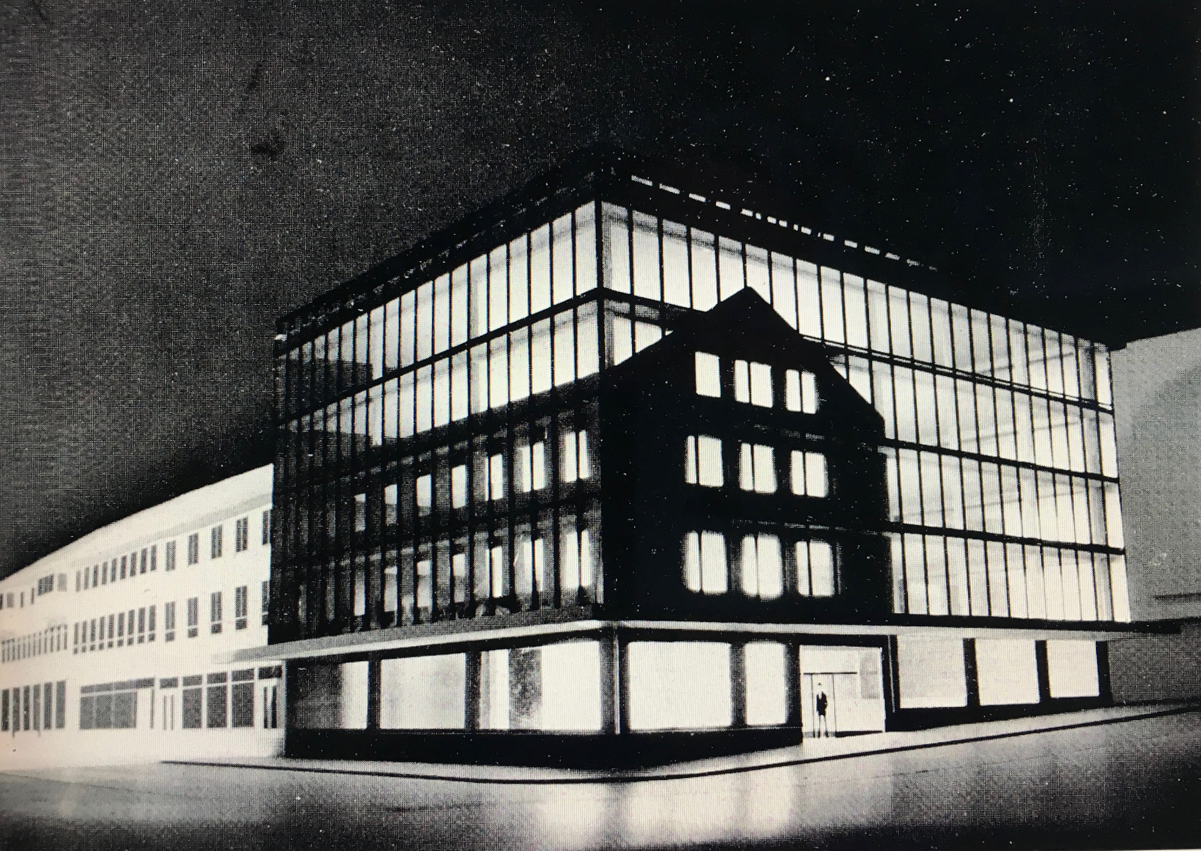 Vinnerprosjekt i internasjonal arkitektkonkurranse i 1975. Prosjektene skulle "uttrykke skjønnheten i arkitekturen ved harmonisk bruk av glass i miljøet". Arkitekt: Boarch arkitekter. Prosjektet er ikke realisert